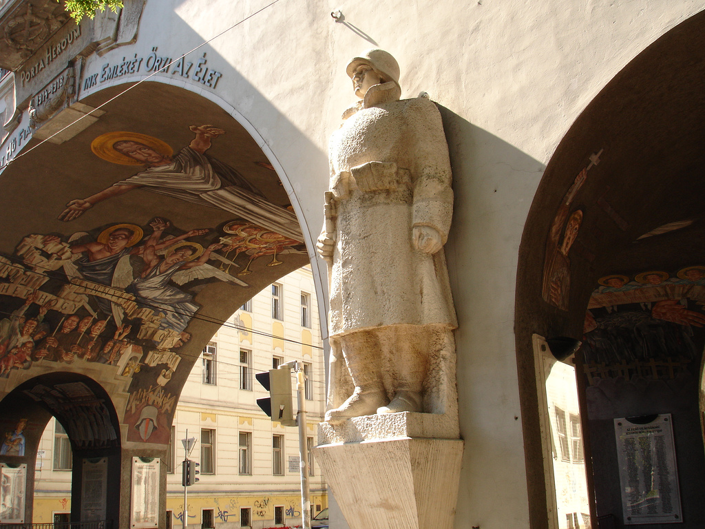 Szeged. A hősök kapujának díszei: Az "Élő katona" homokkő, Lőte Éva szobrászművész munkája 1937. This is a photo of a monument in Hungary. Identifier: 9261